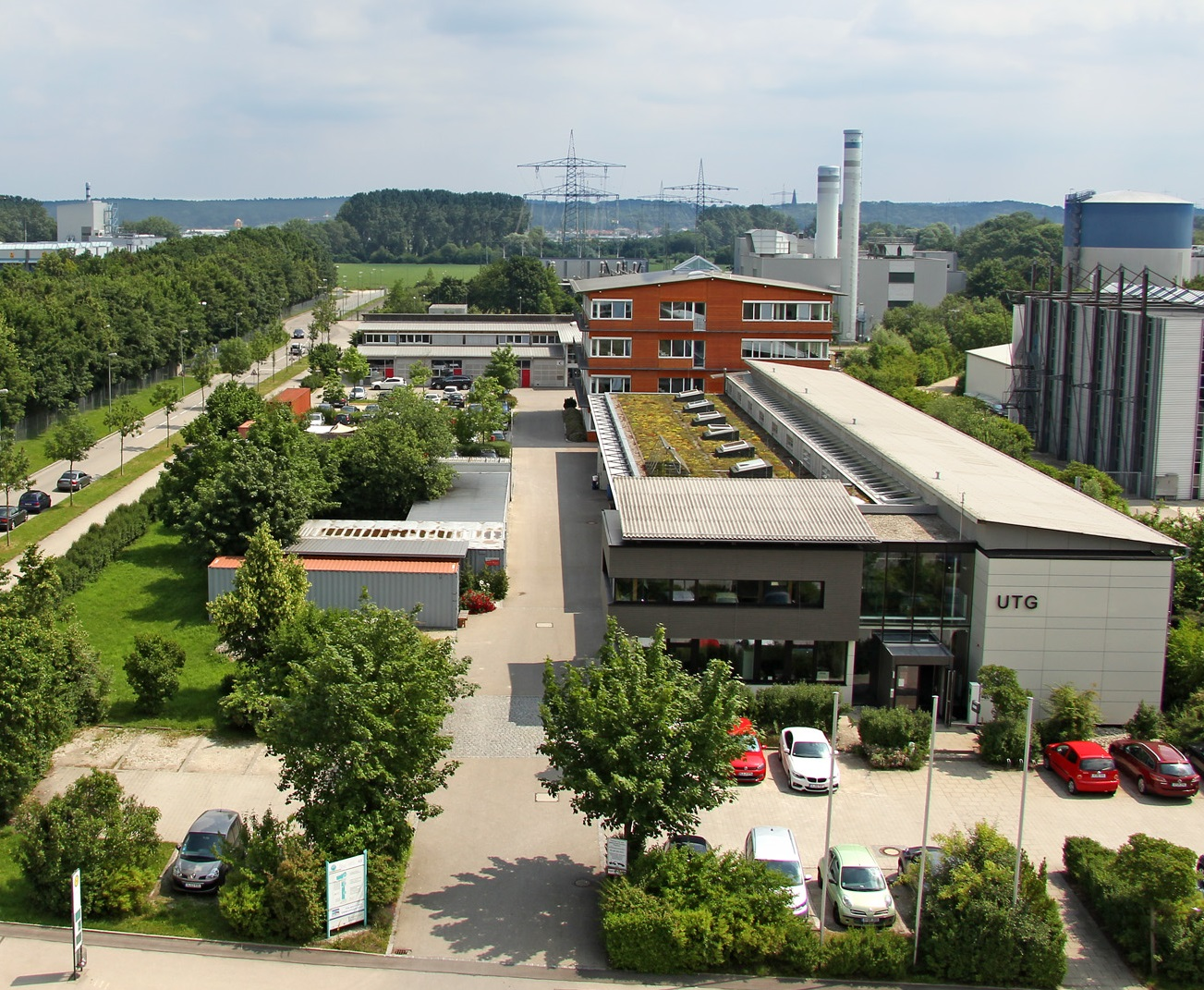 Das Gelände des Umwelt-Technologischen Gründerzentrums Augsburg mit seinen drei Gebäuden. Hinten Umspannwerk Lechhausen, Gasturbinen-Heizkraftwerk (swa) mit Fernwärmespeicher (rechts)